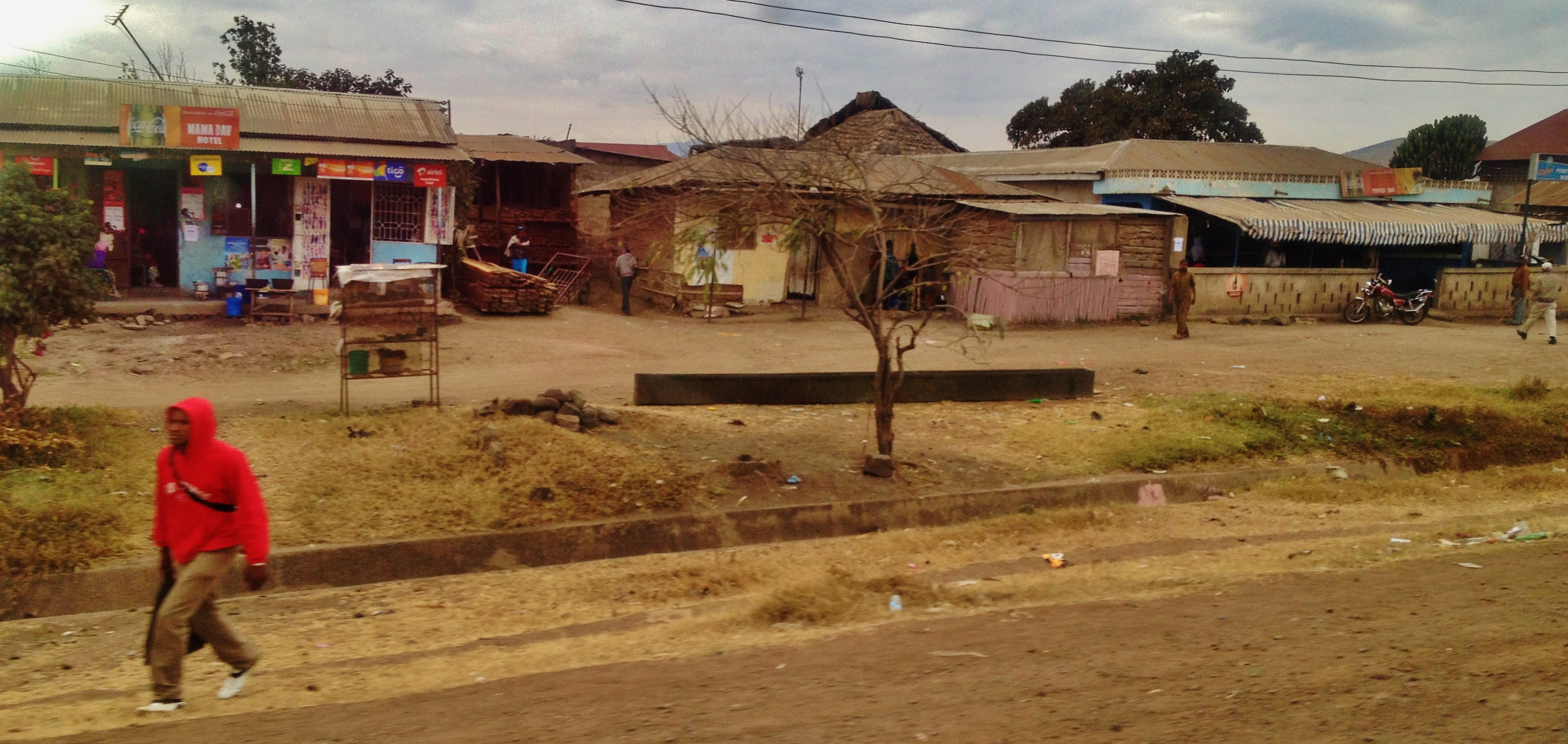 Scenes around Karatu, Tanzania